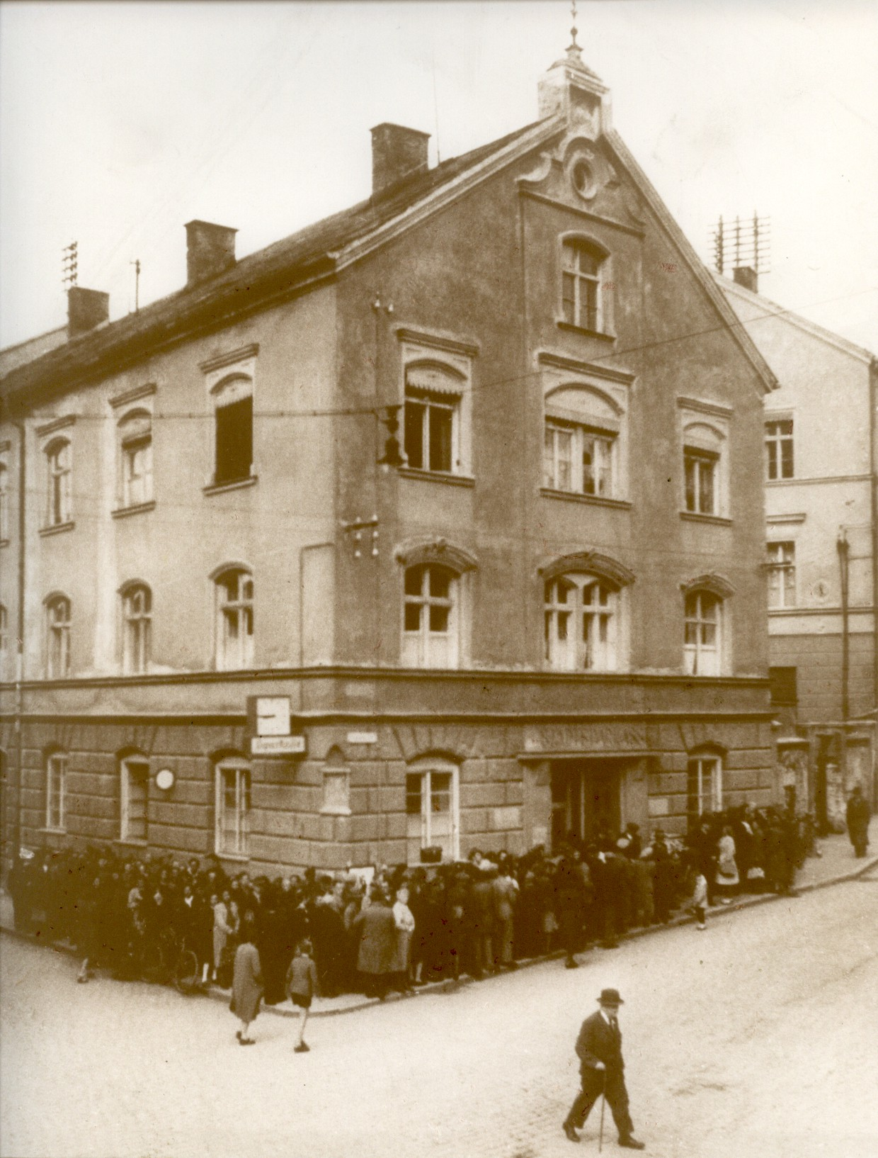 Hauptstelle der Sparkasse Neuburg 1948